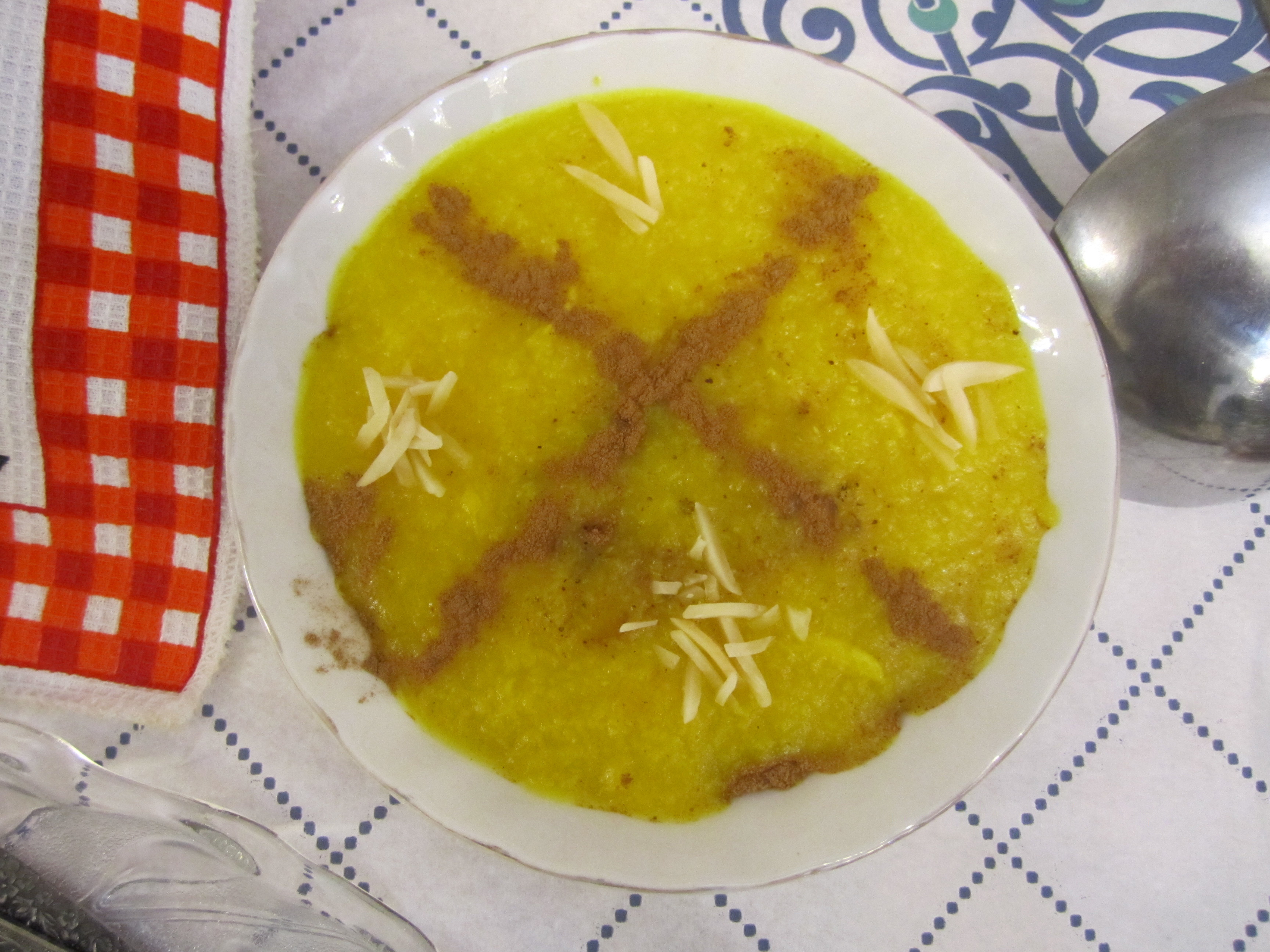 شل زرد